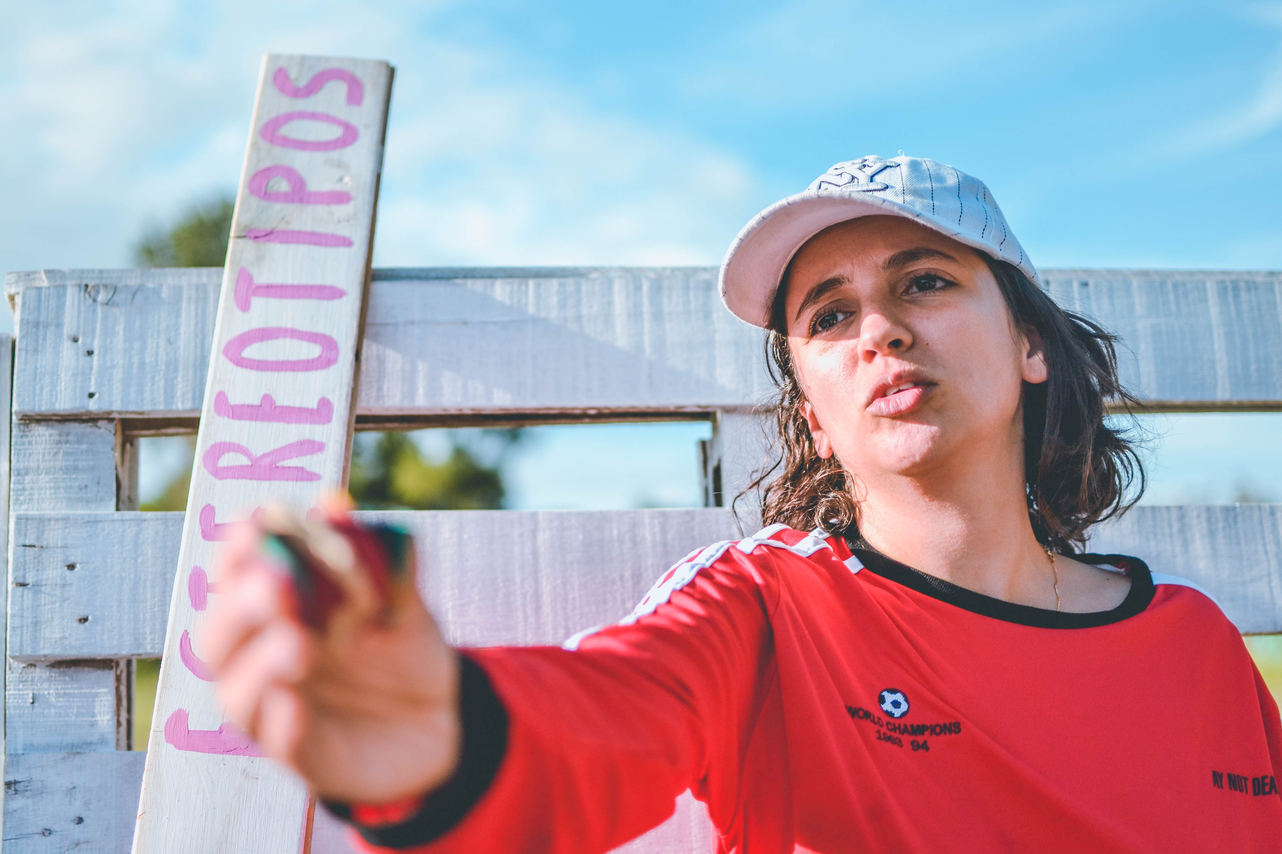 Bárbara "Barbi" Recanati (n. Buenos Aires, Argentina, 28 de noviembre de 1986) es una cantante, compositora y guitarrista de rock de Argentina. Fue la vocalista y guitarrista rítmica de la agrupación de rock alternativo, garage y punk Utopians desde el año 2005 hasta su disolución 2017. En 2018 presentó su nuevo proyecto musical como solista.